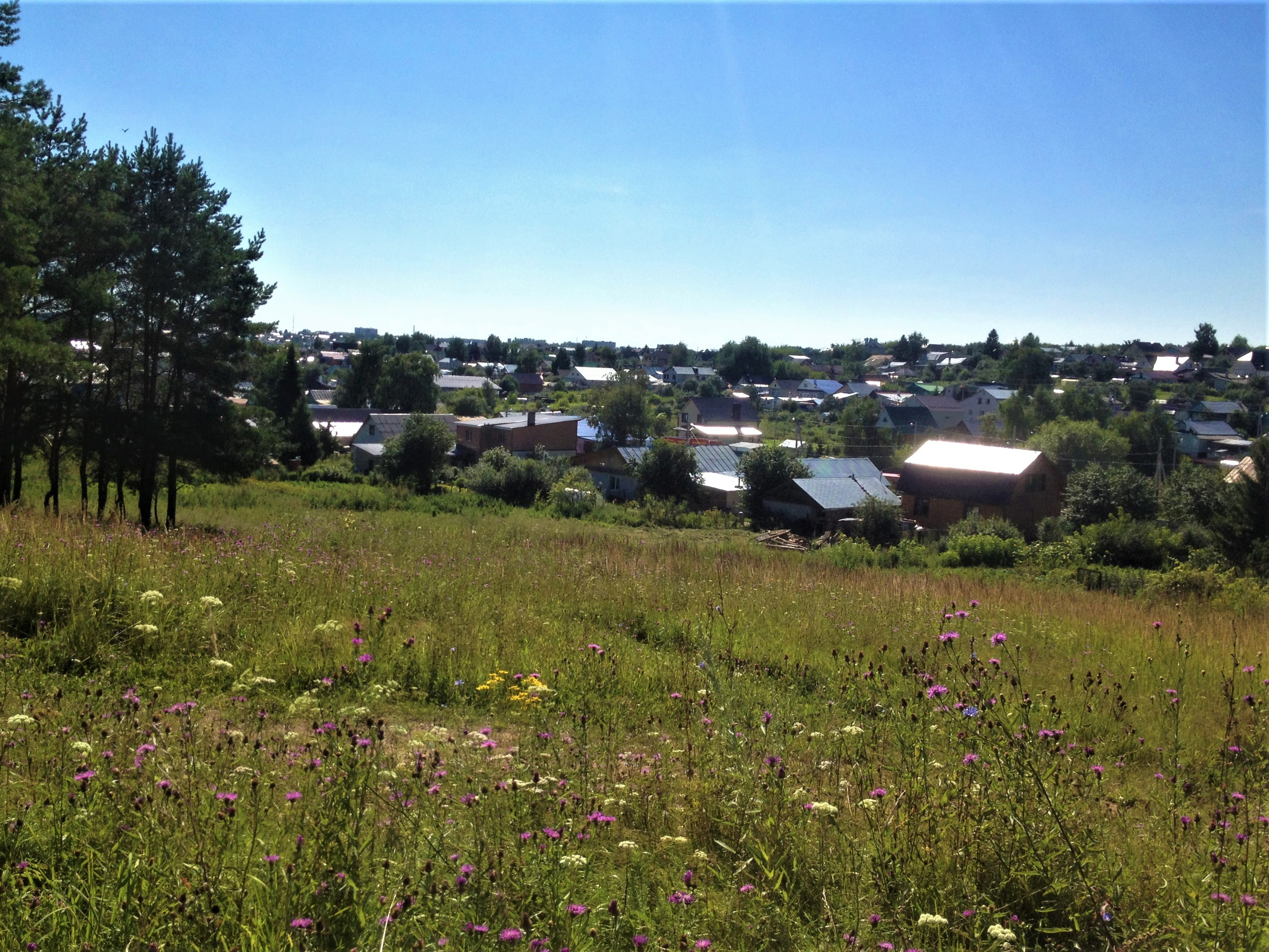 Посёлок "Сухая река" (г. Казань) (вид с холма, со стороны Сухорецкого кладбища).